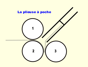 réalisation perso